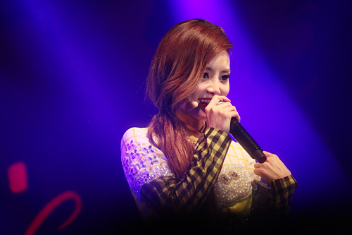 攝於2012/12/24首爾Tonight 37.2℃演唱會